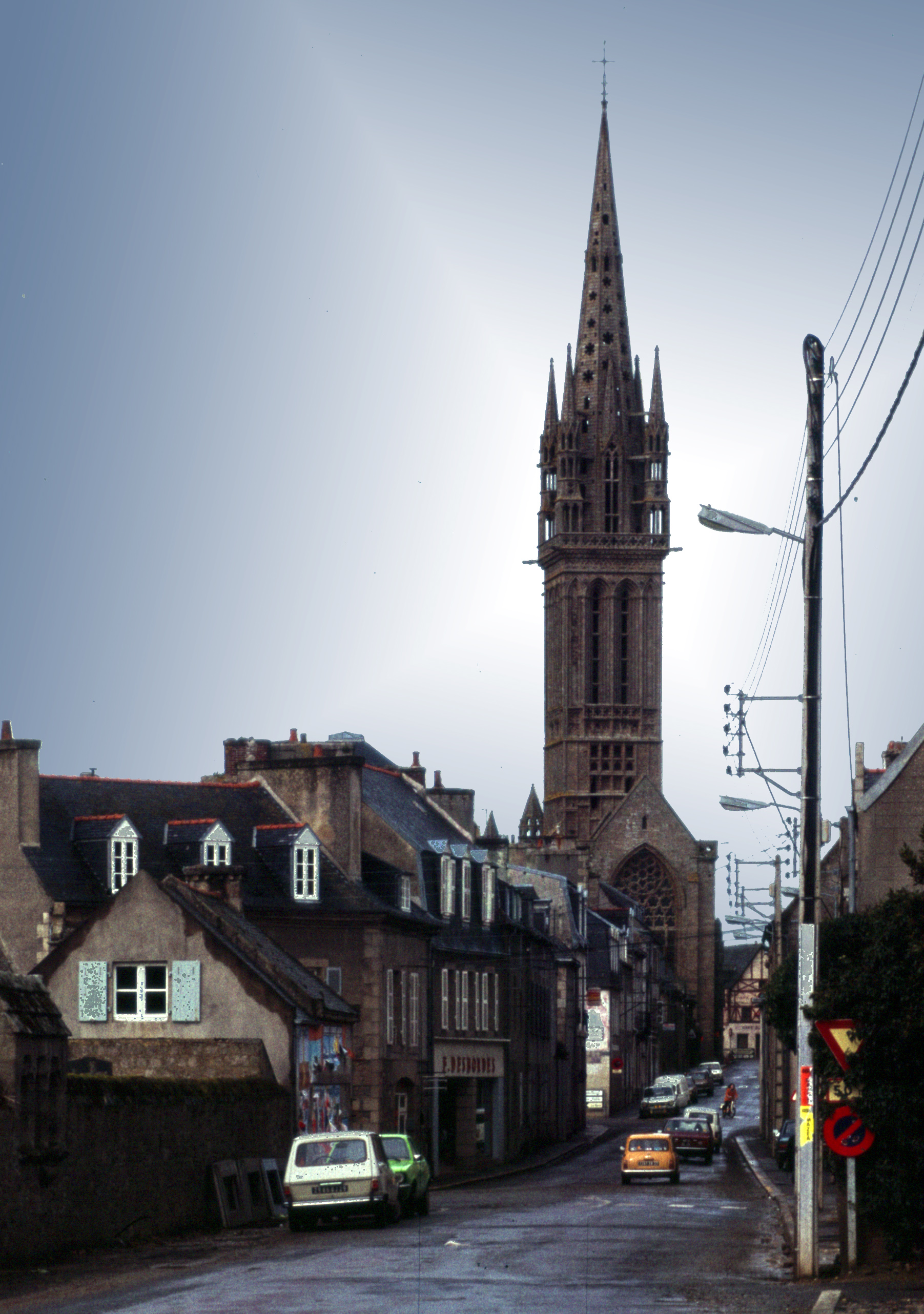 Saint-Pol-de-Léon